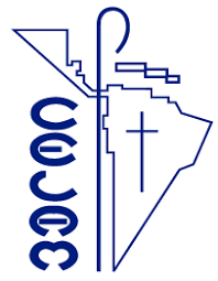 Logotipo del CELAM